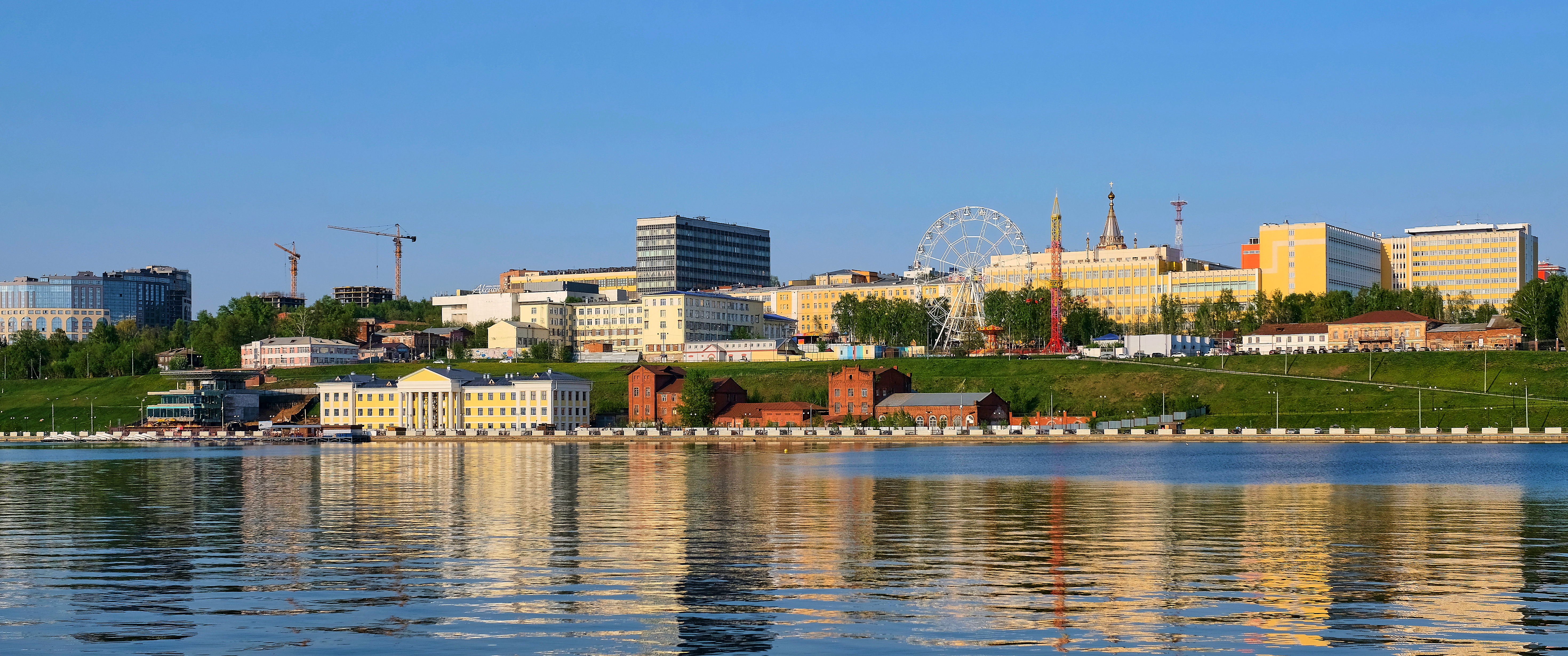 Вид на набережную Зодчего Дудина в Ижевске